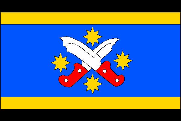 Vlajka obce Lechotice